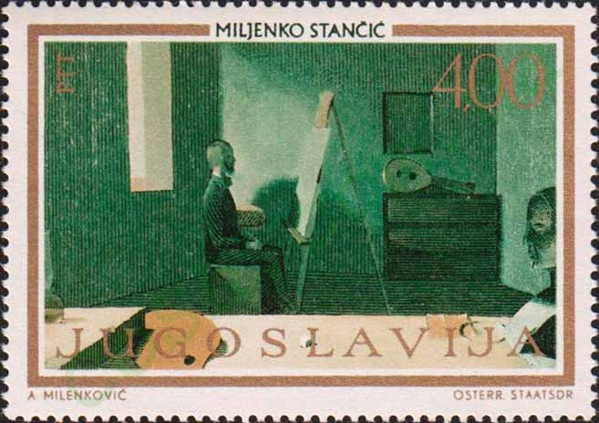 "В честь Караса". М. Станич